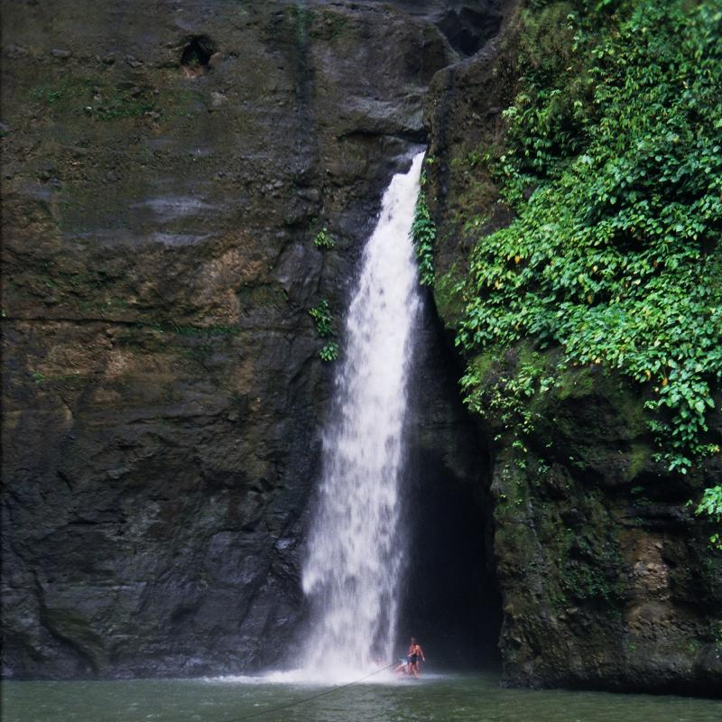 Pagsanjan Falls, Laguna, Philippines, Ausflug während der Schacholympiade 1992 in Manila.